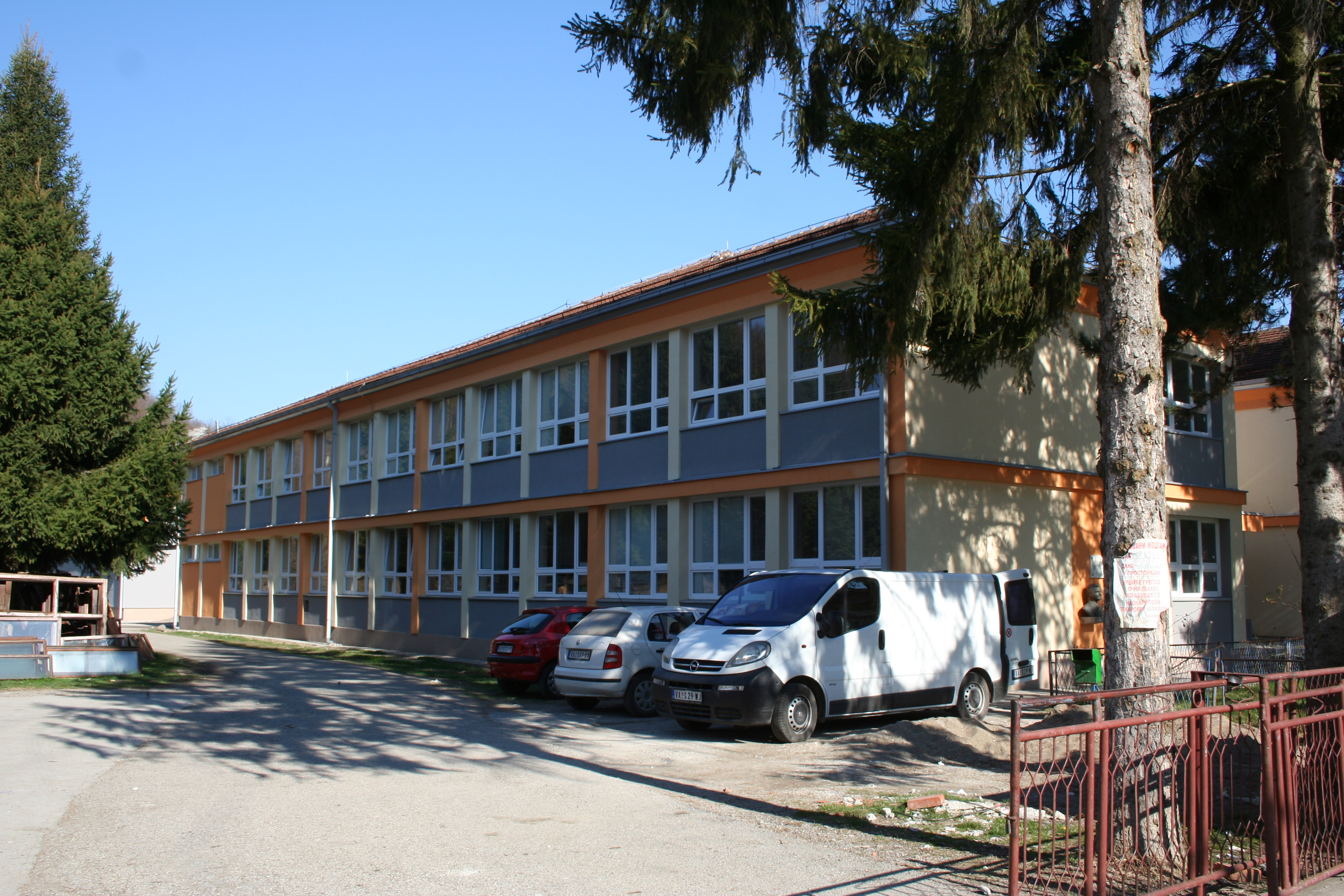 Pecka, Osečina